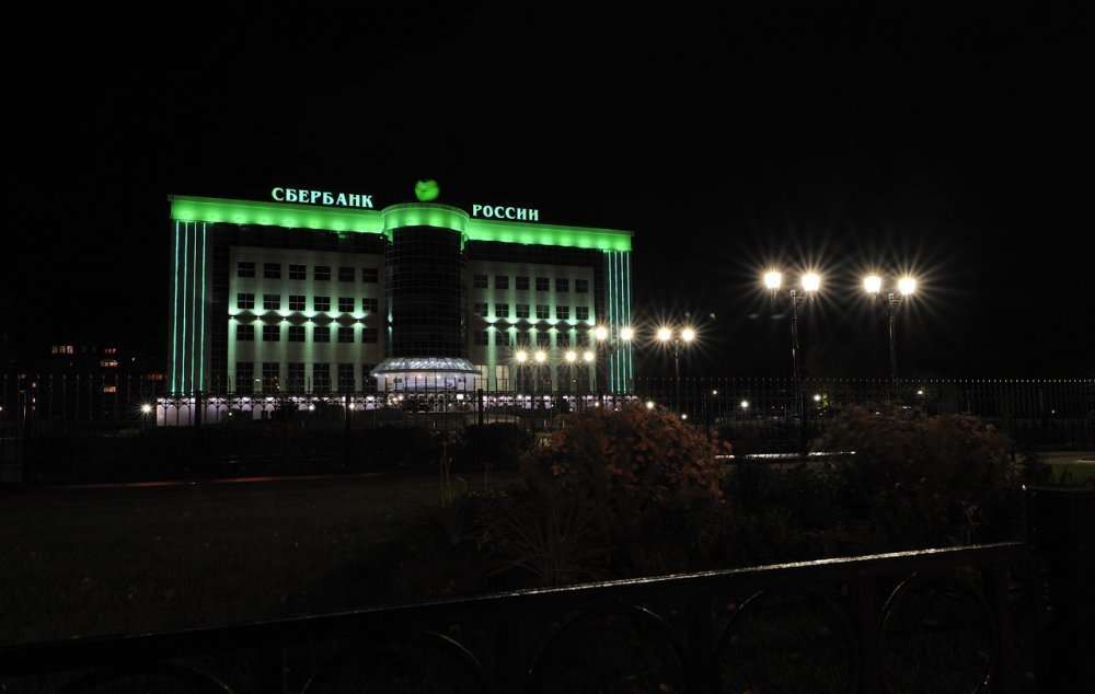 Centra oficejo de la Okcident-Siberia banko de la Sberbanko de Rusio. (Tjumeno, Rusio)